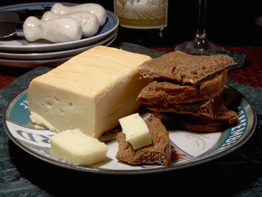 Limburger cheese